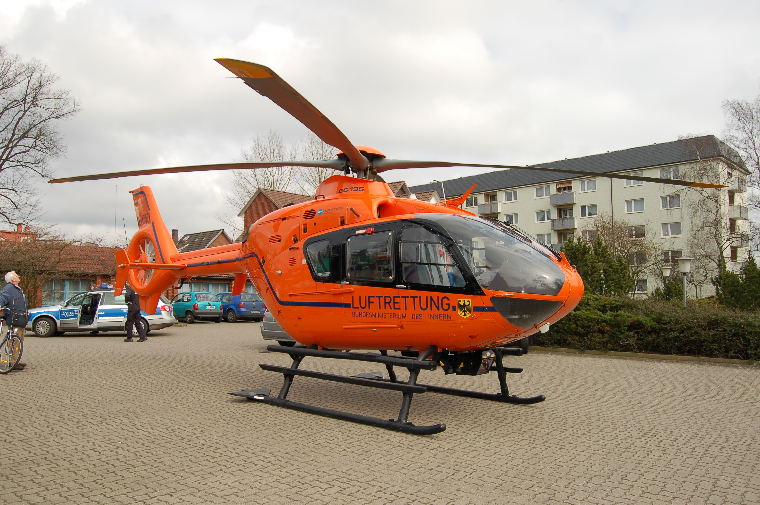 Rettungshubschrauber bei einem Einsatz in Uetersen; Kennung: D-HZSD